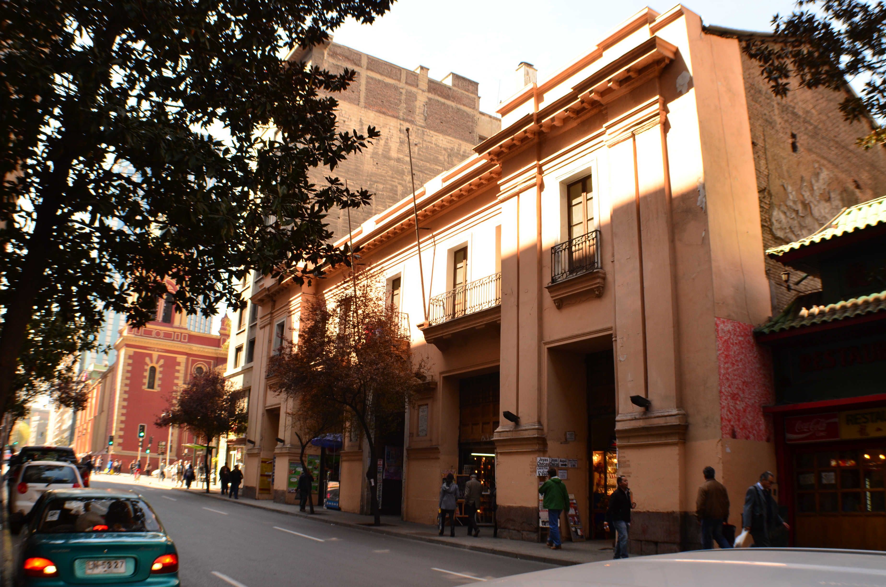 Casa del presidente Manuel Montt This is a photo of a national monument in Chile: 808